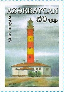 Lighthouses of Azerbaijan. N 1084 - 50 qapik. There are pictured Chilov lighthouse on the stamp. Çilov Adası (Jilov, Chilov Island) {Ostrov Zhiloy}